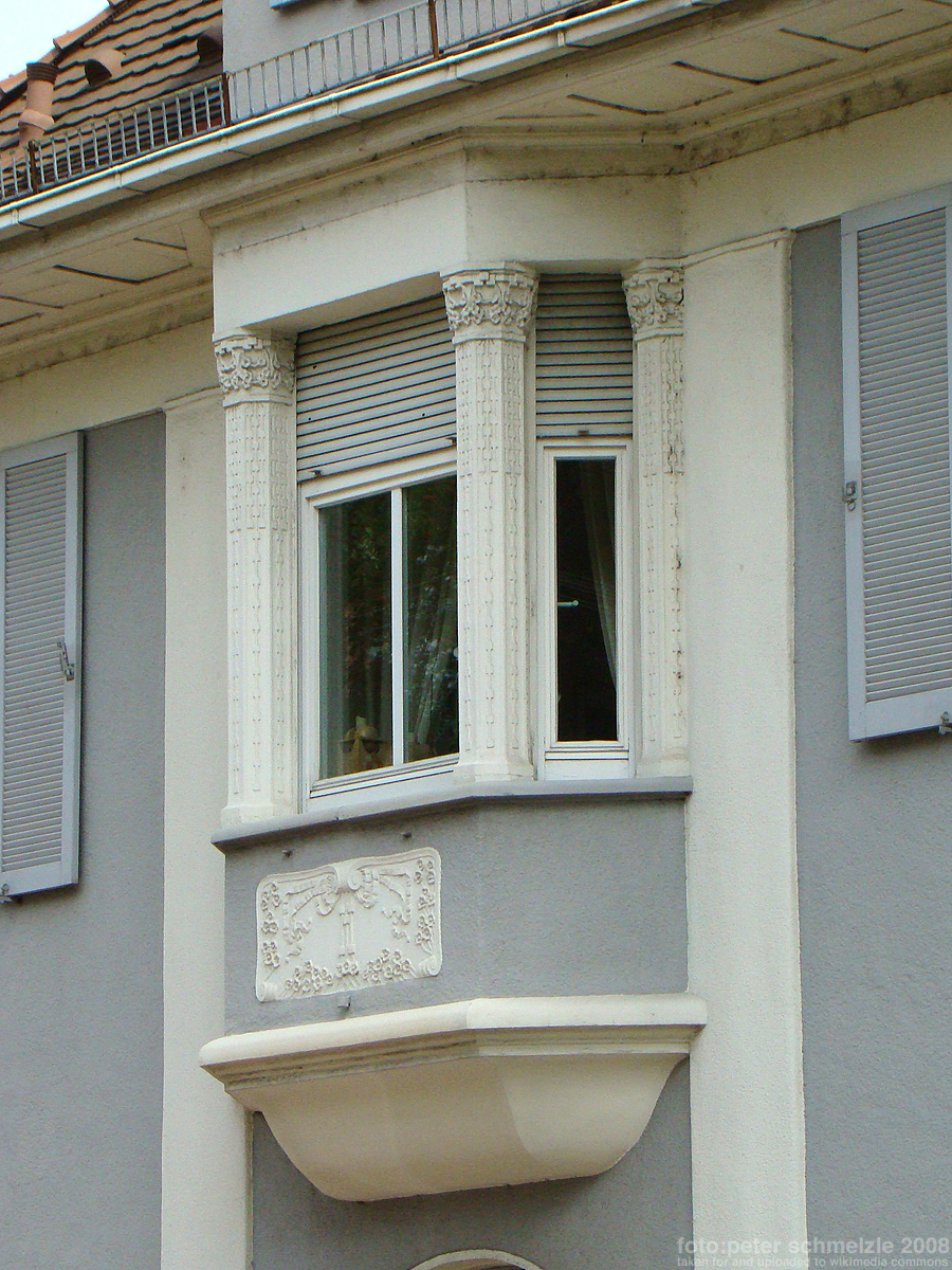 Denkmalgeschützte Gebäude Ludwigsburger Str. 61 in Heilbronn-Böckingen, Detail